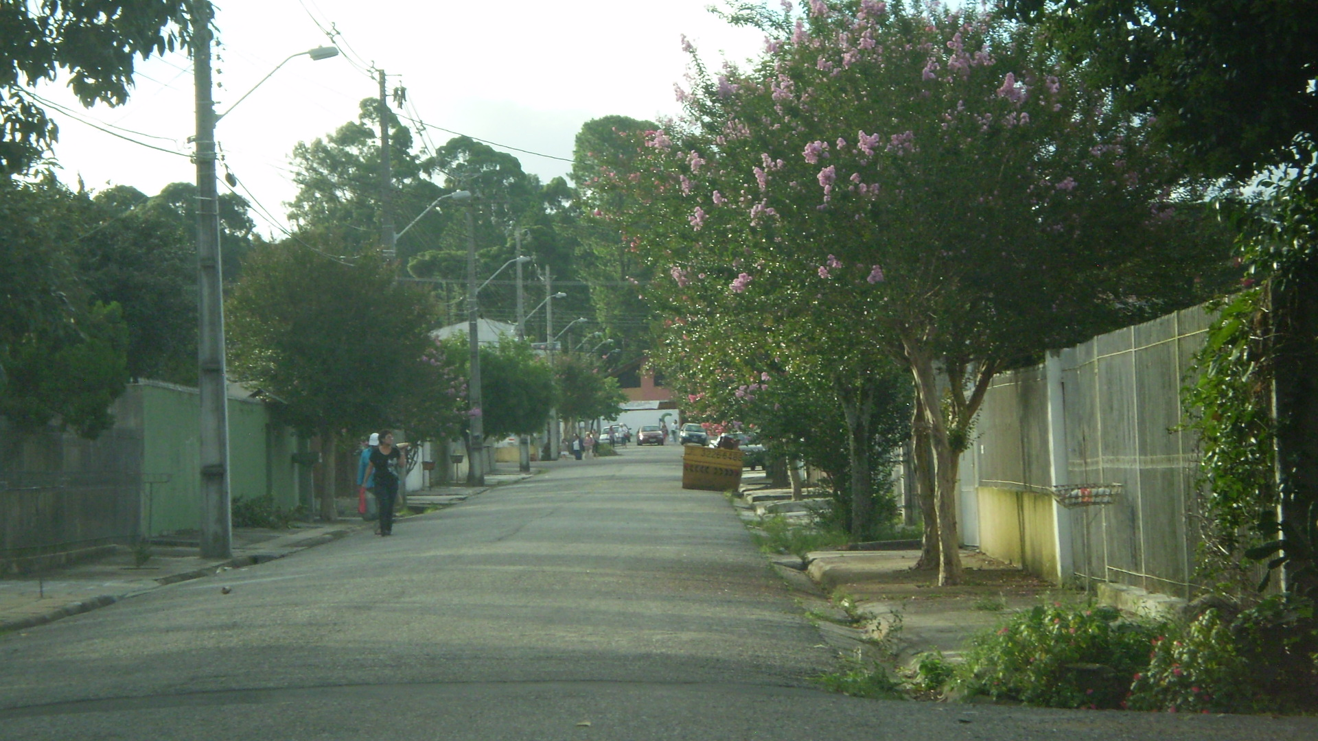 Rua Reverendo Mariano Rodrigues de Castro - Curitiba